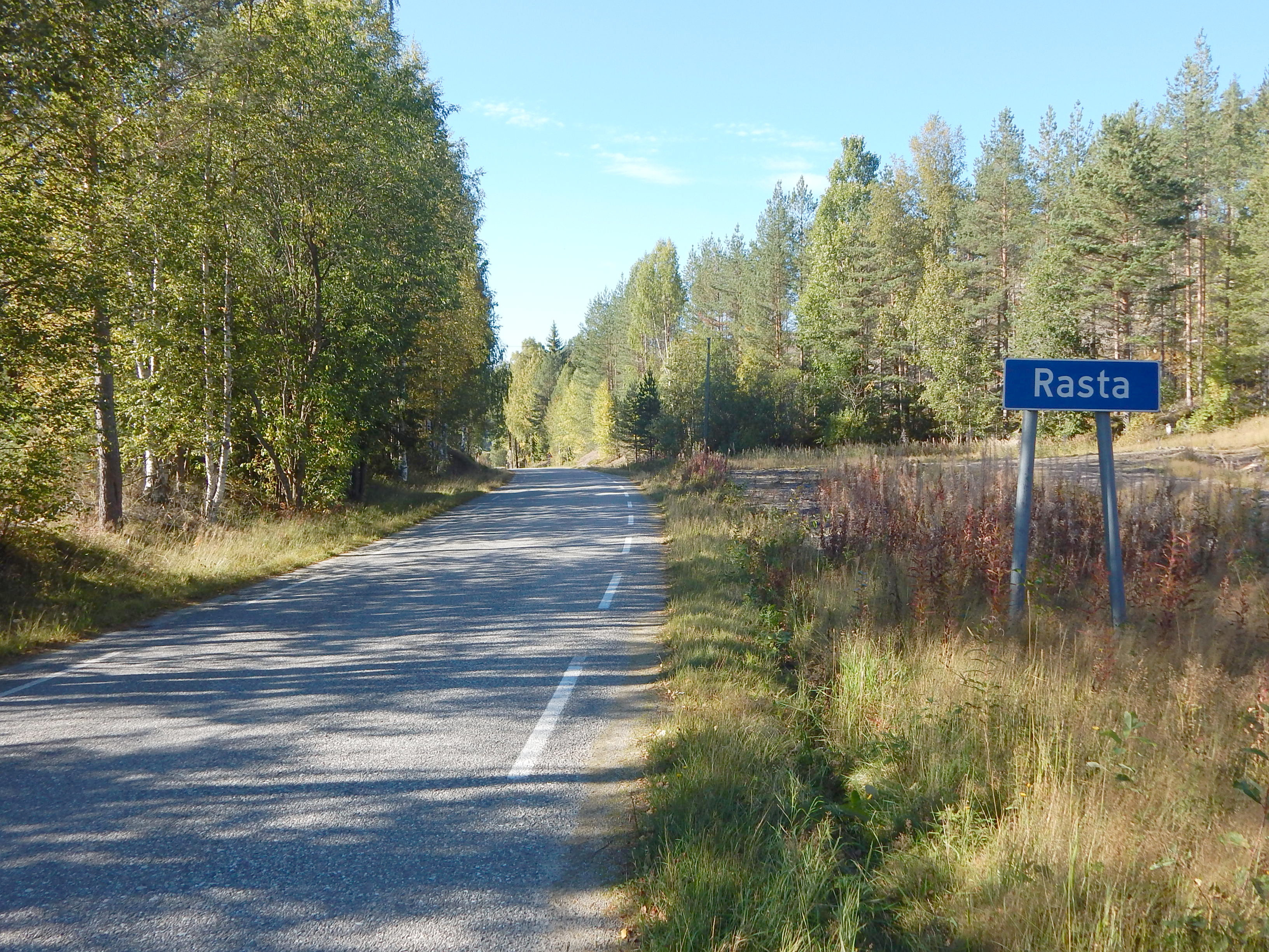 Fylkesvei 606 ved Rasta